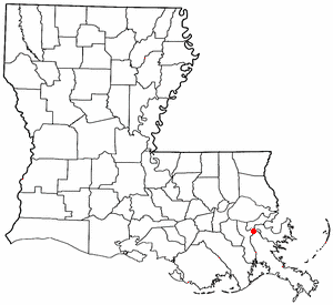 Map